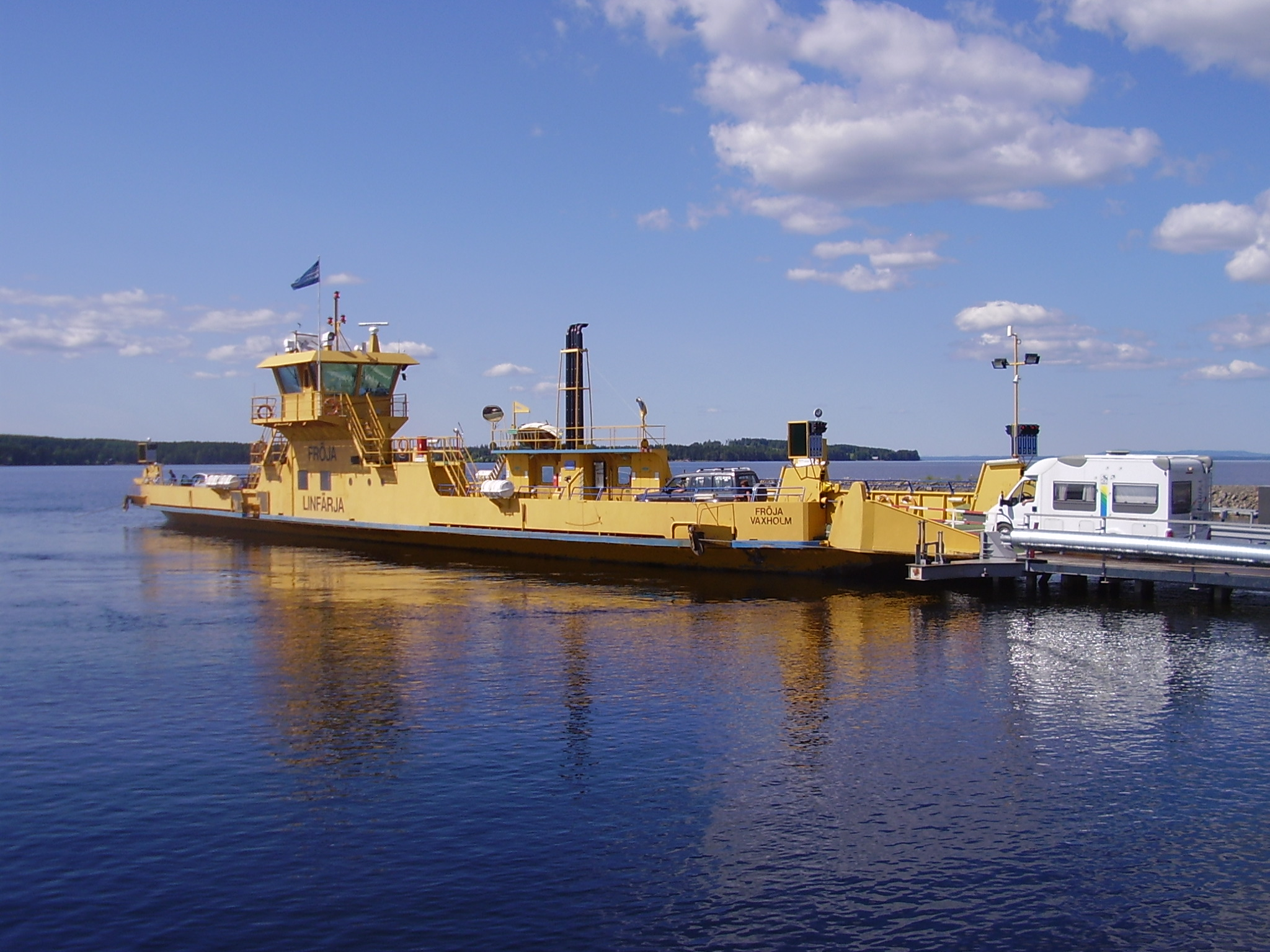 Bilfärjan Fröja på Isöleden i Storsjön